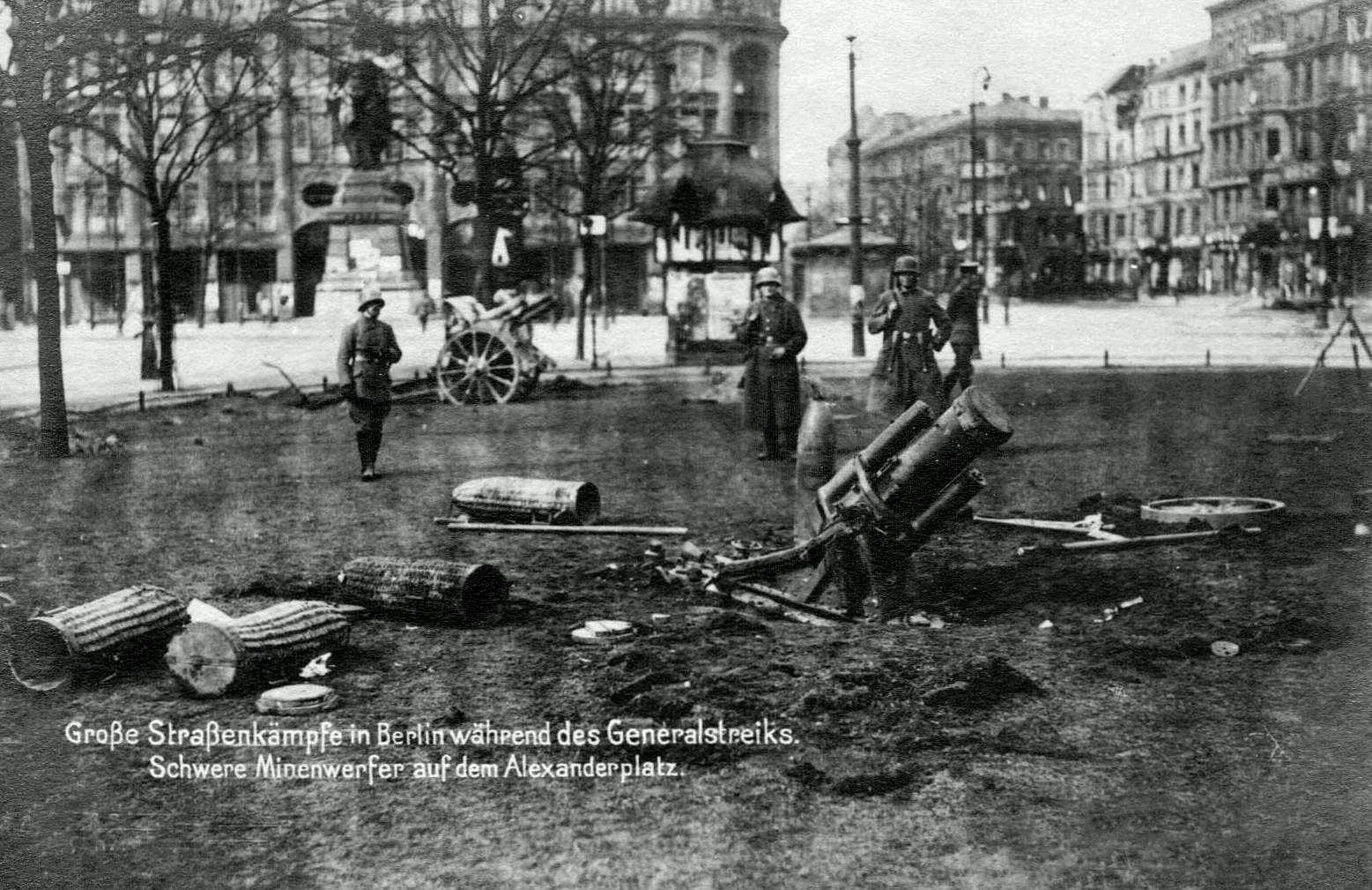 Große Straßenkämpfe in Berlin während des Generalstreiks. Schwere Minenwerfer auf dem Alexanderplatz.